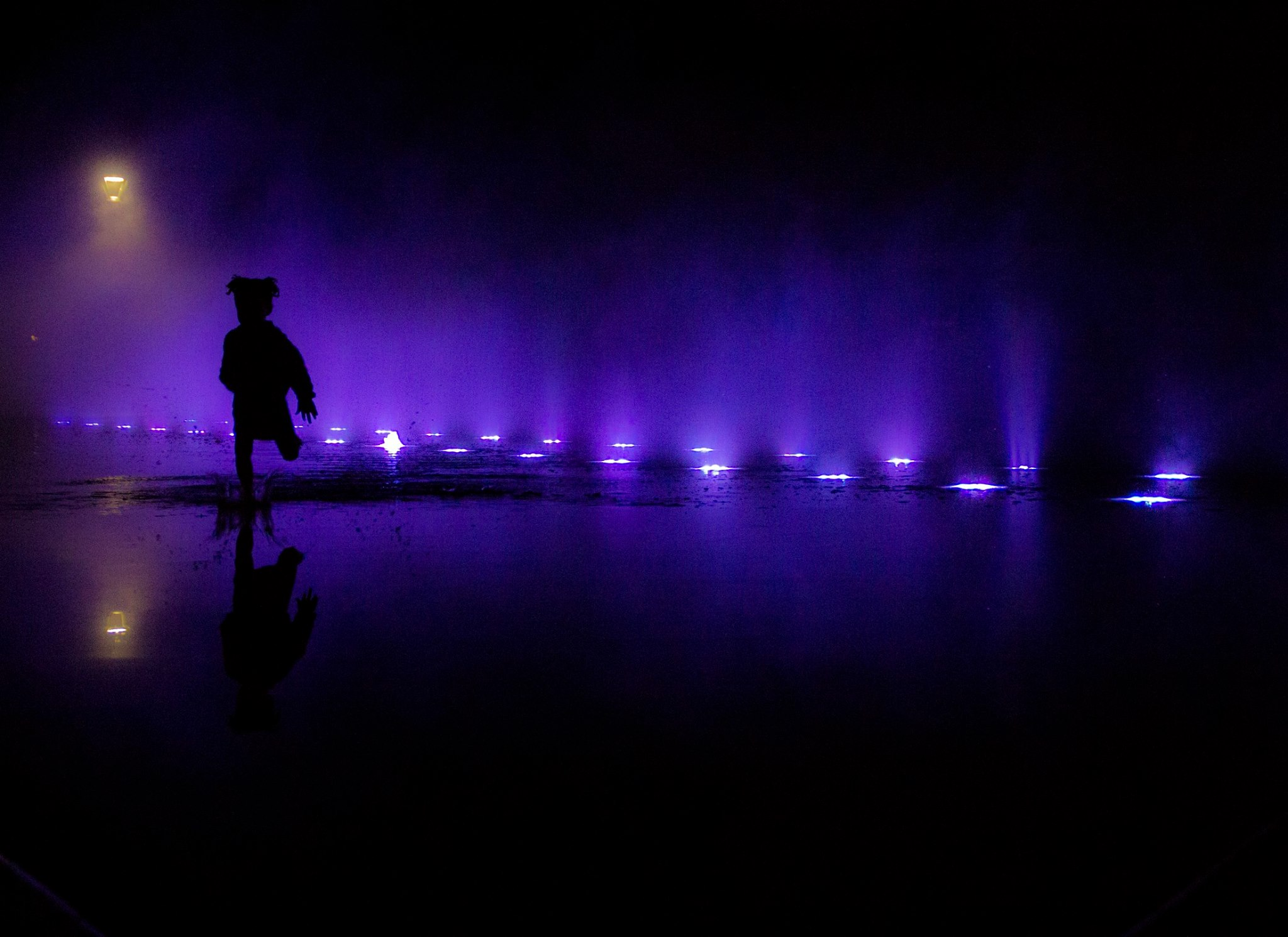 2h de patience pour obtenir cette photo sans retouche ni filtre...